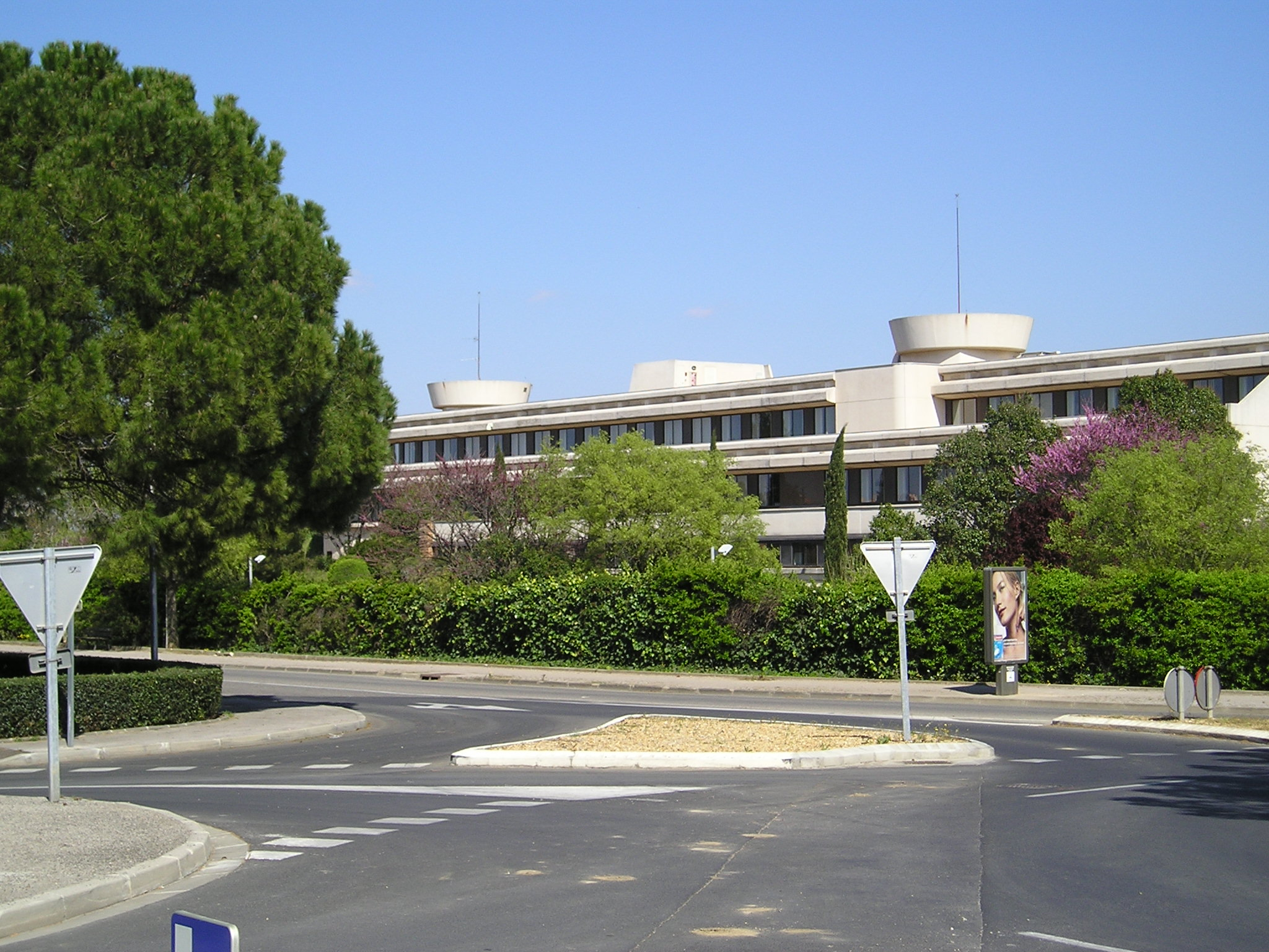 A Maurin, commune de Lattes, le siège social du Crédit agricole du Midi. La place visible sur cette image-ci se trouve à droite du photographe.